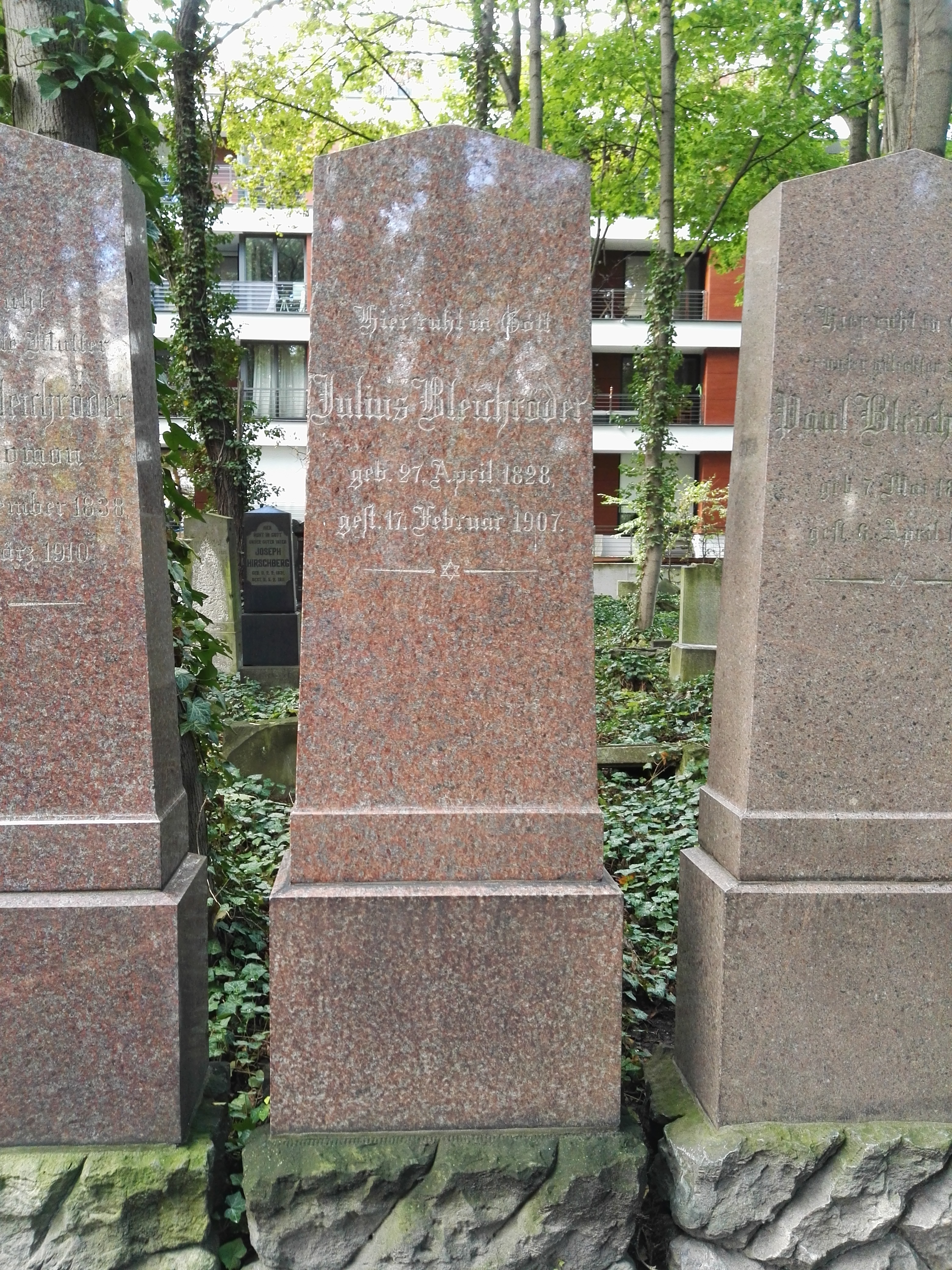 Grab von Julius Bleichröder auf dem Jüdischen Friedhof Schönhauser Alleee